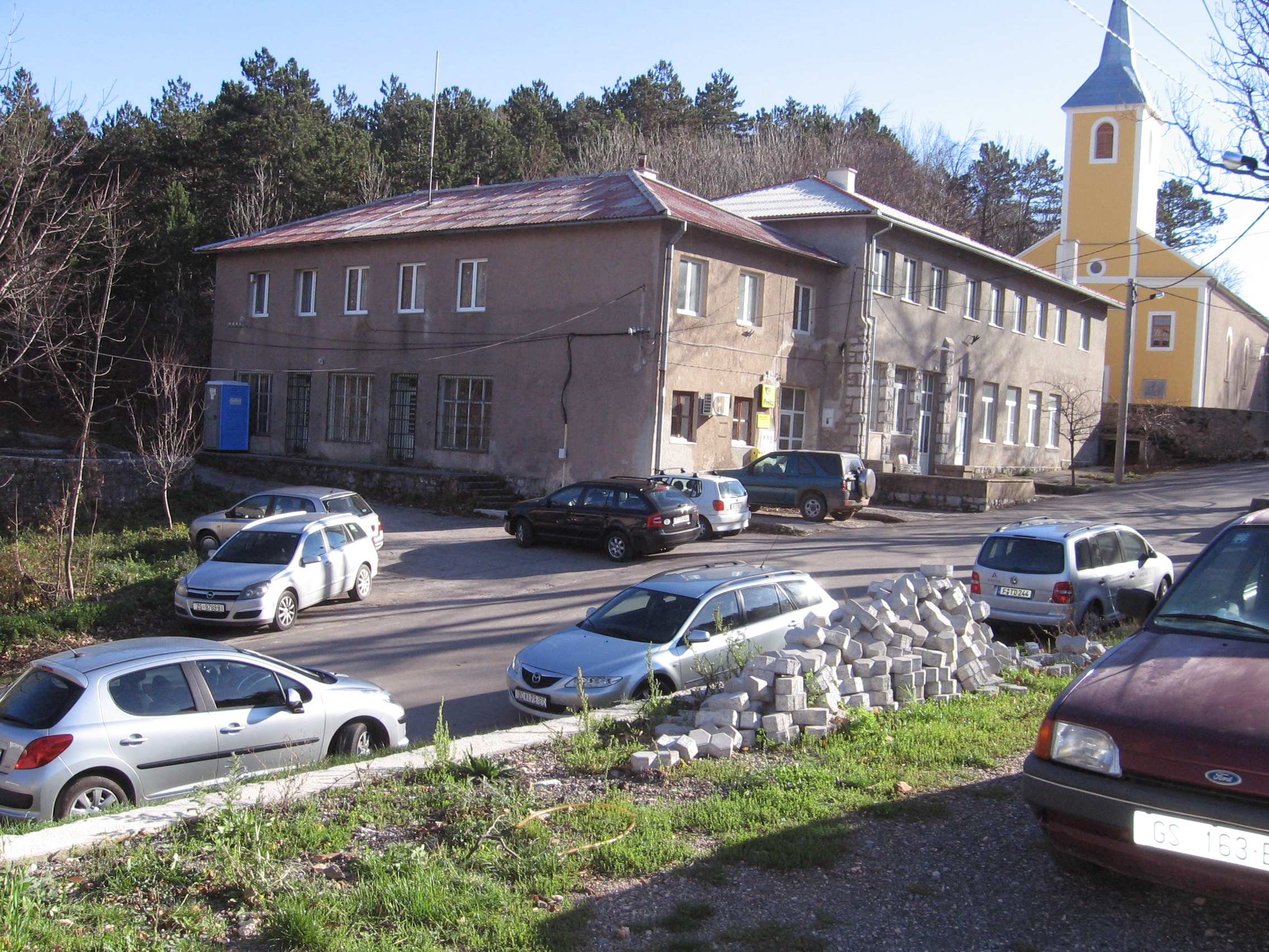 Podbilo